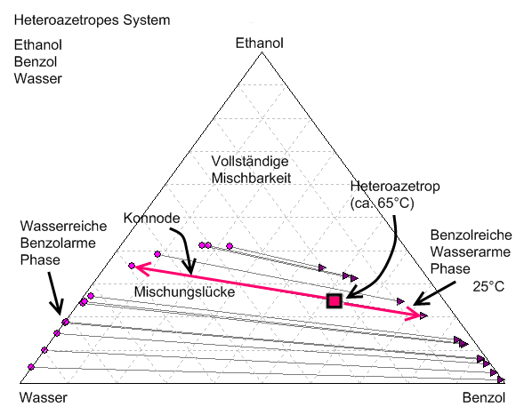 Ethanol-Wasser-Benzol-LLE-Heteroazetrop